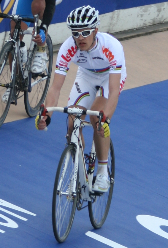 Jasper Stuyven à l'arrivée du Paris-Roubaix Juniors 2010